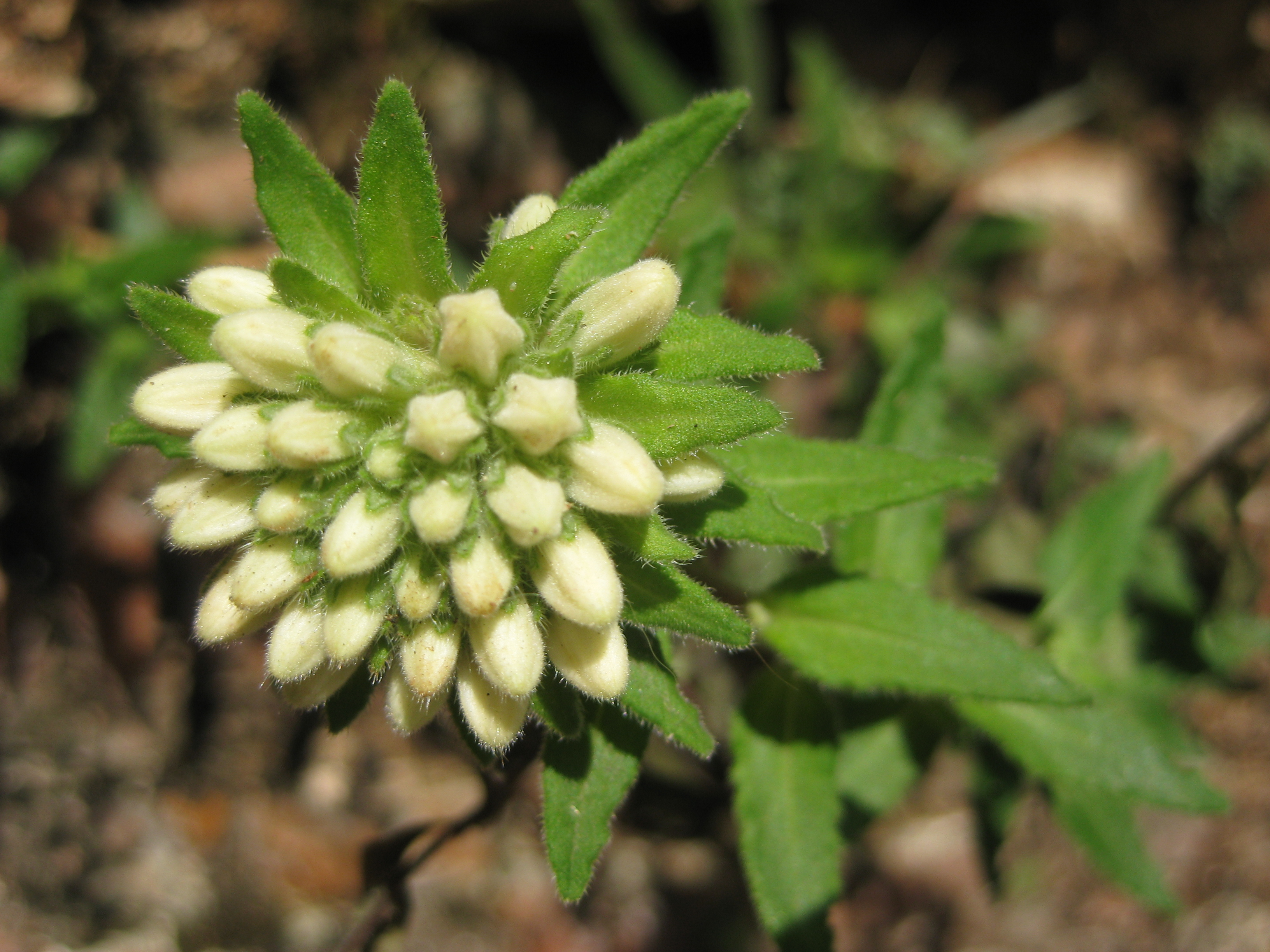 Campanula petraea in Spiazzi